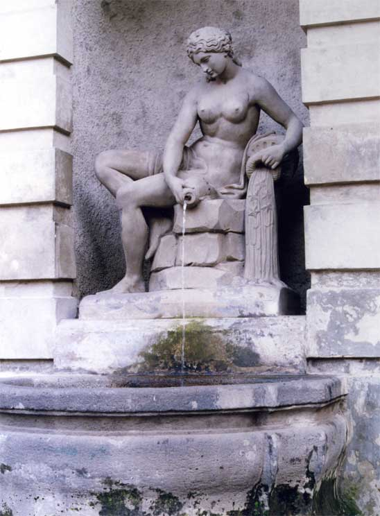 Kašna Alegorie Vltavy ("Terezka") v severní zdi Clam-Gallasovského paláce na Mariánském náměstí na Starém Městě v Praze.